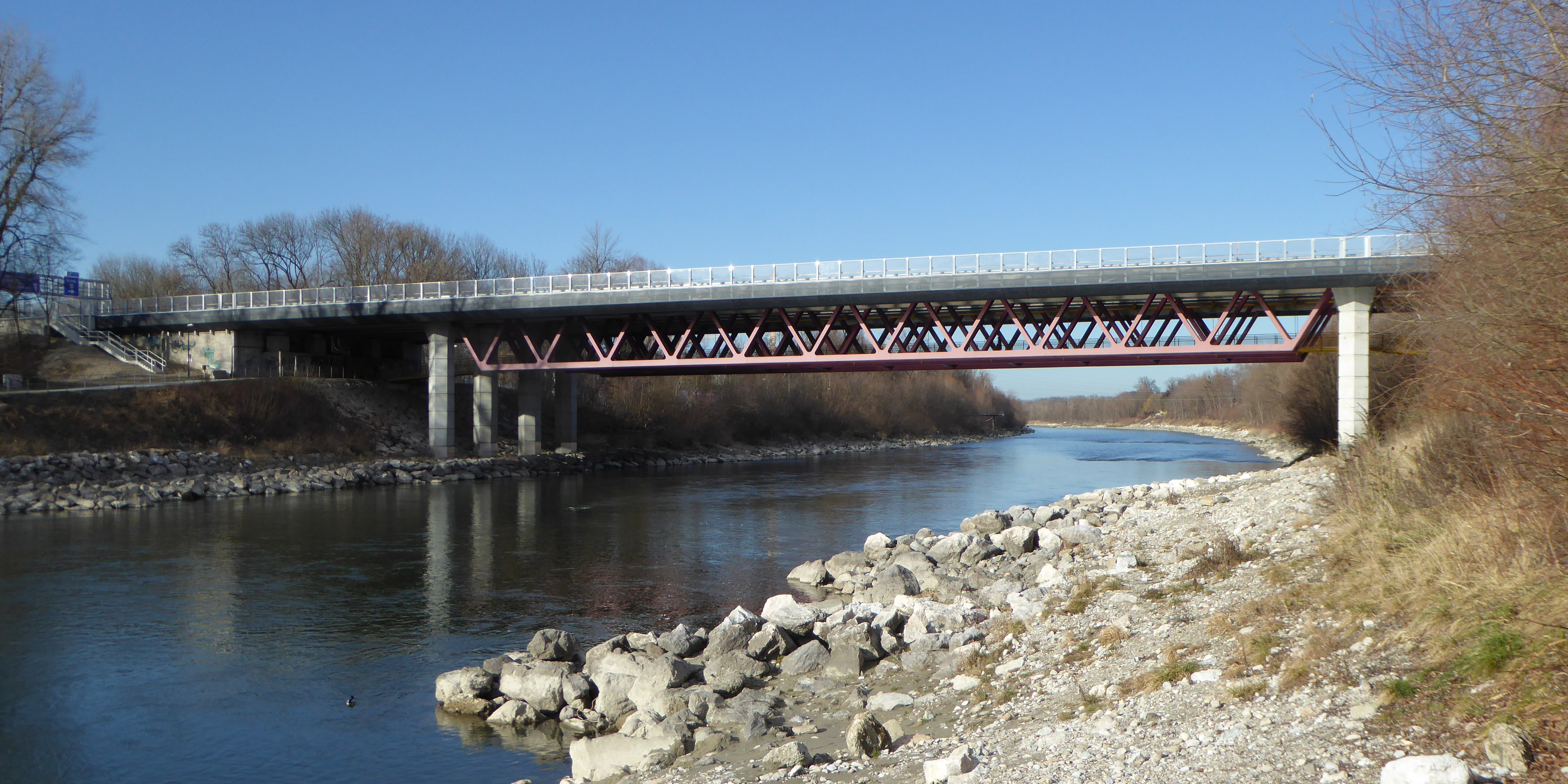 Boarisch: Soizbuag, de Bruckn vo da Westautobahn iwa d'Soizach.